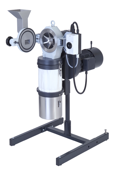 Schlagrotormühle zur Grob- oder Feinzerkleinerung und Desagglomeration von weichen, mittelharten und faserigen Materialien. Urheber: Retsch GmbH Freigabe